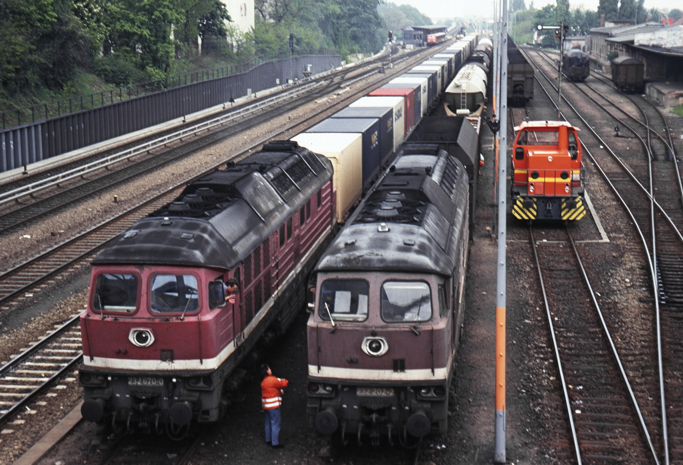 Güterbahnhof Berlin-Neukölln